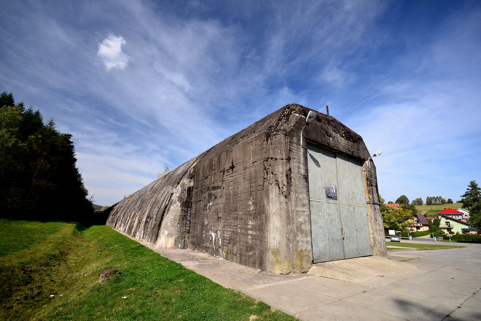 Stępina - schron tunelowy dla pociągu sztabowego, 1940–1941